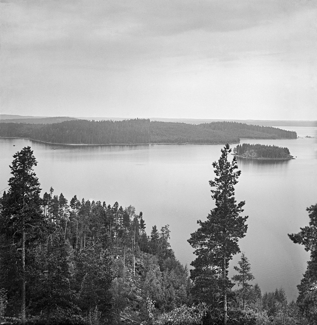 I. K. Inha: Päijänne, 1913-1914. Suomen valokuvataiteen museo